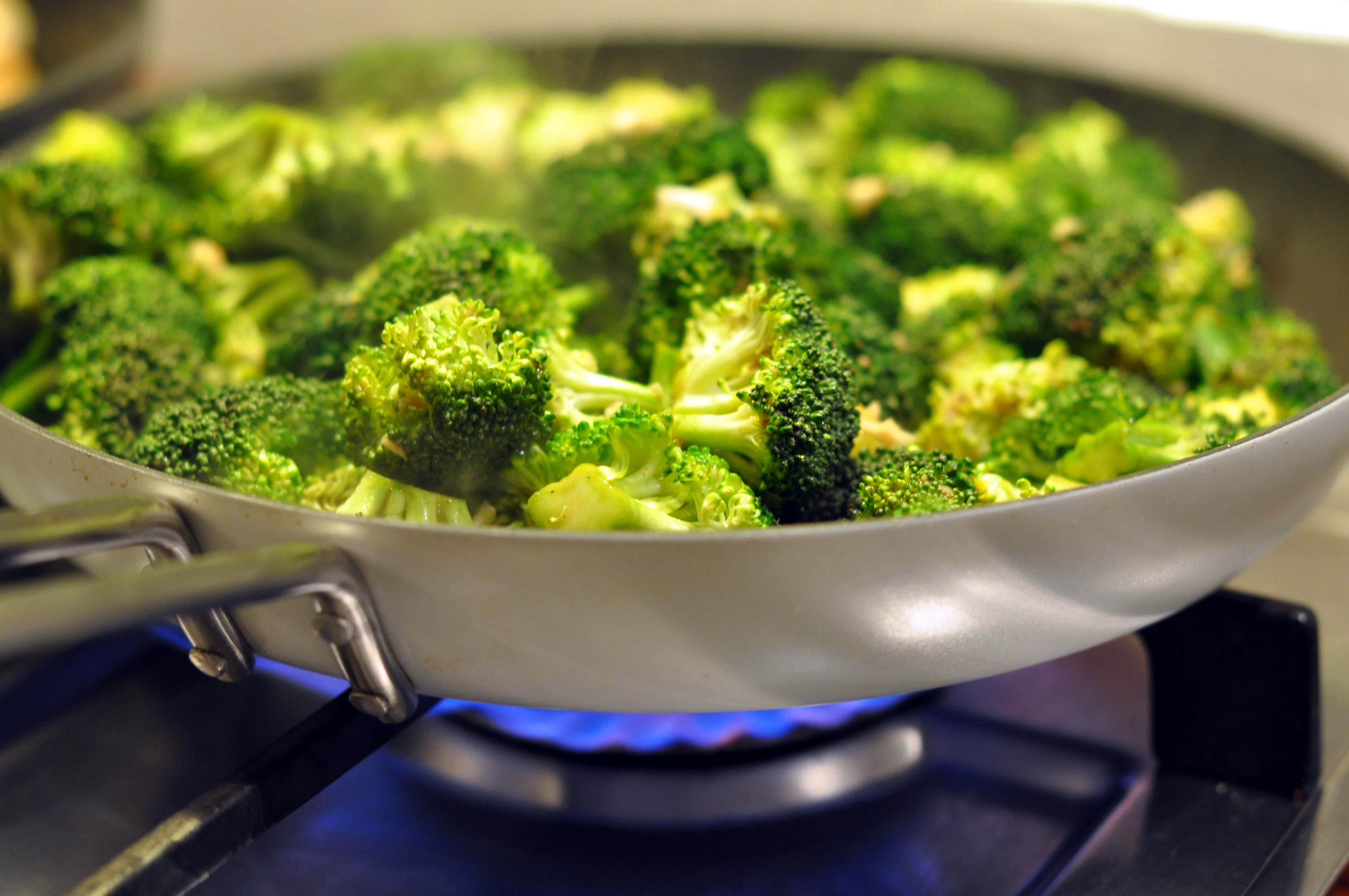 Broccoli med hvidløg og hoisin-sauce